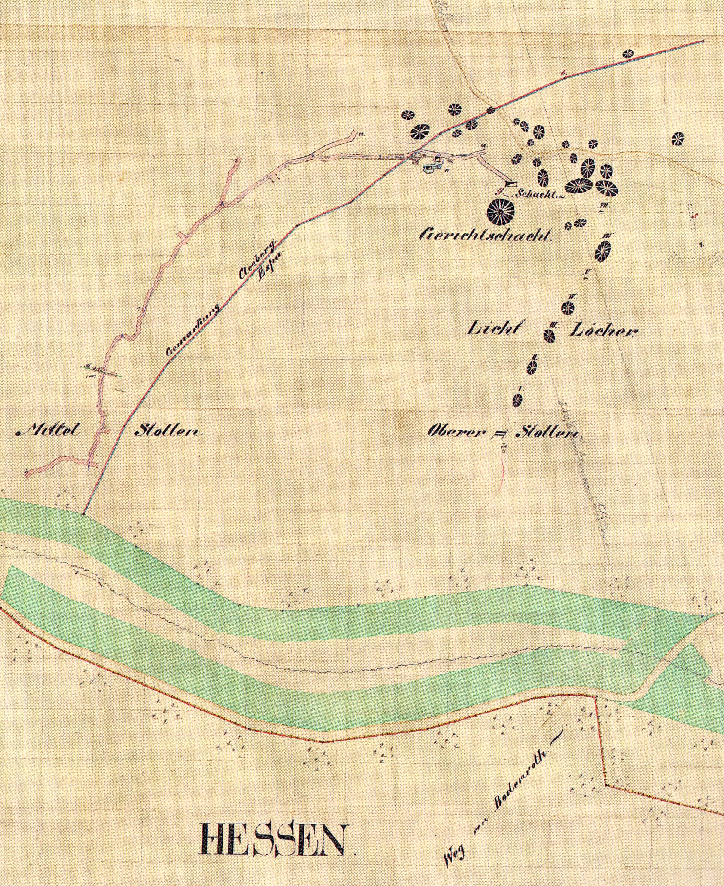 Plan der Grube Silbersegen vom Oktober 1856. Im rechten oberen Quadranten der Abbildung ist das ausgedehnte Pingenfeld eingezeichnet - trichterförmige Vertiefungen im Gelände, die durch eingestürzte Schächte entstanden sind. Der Verlauf des 1856 bereits eingestürzten Oberen Stollen läßt sich gut am Verlauf der Pingen der Lichtlöcher erkennen, dieser Stollen endete am Gerichtschacht. Der modernere Mittel Stollen ist rötlich eingezeichnet und beginnt am linken Bildrand, verläuft in nordöstlicher Richtung parallel zur Grenze Epsa/Cleeberg - erst kurz vor dem Abbaugebiet unterquert er die Grenze. Grün eingezeichnet ist das Solmsbachtal. Der Plan ist genordet.